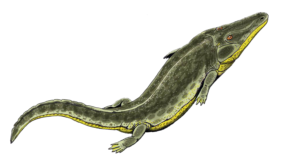 Бентозух